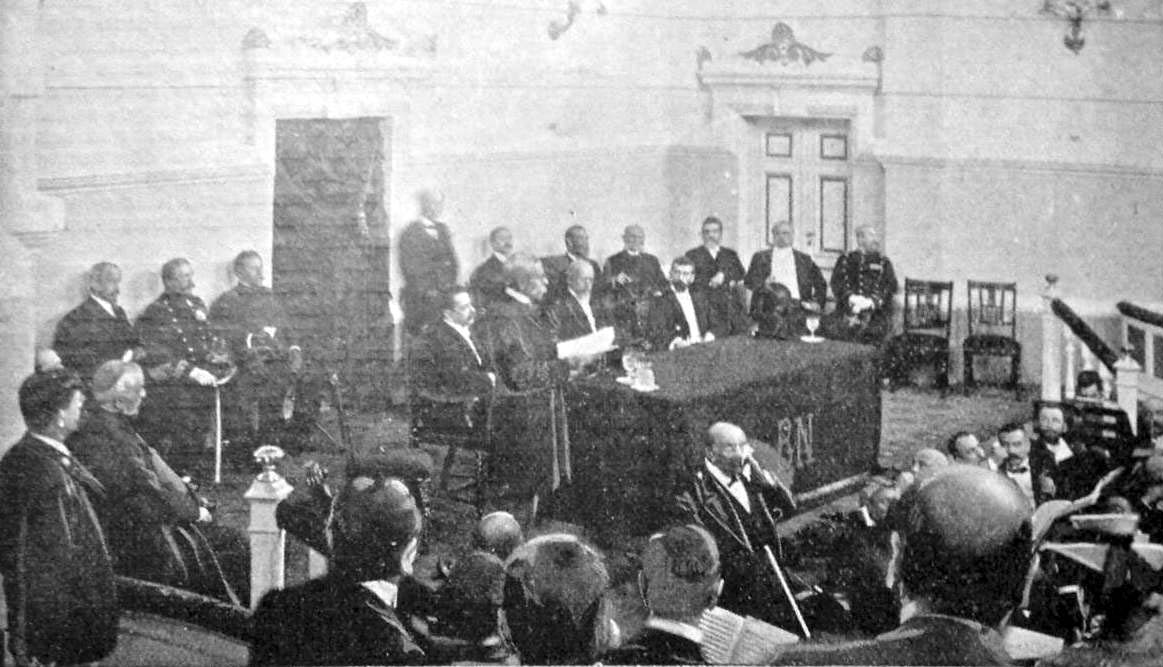 Discursos de Joaquín V. González y Paul Groussac durante la inauguración del edificio de la calle México 564, de la Biblioteca Nacional. Con presencia del presidente Julio Argentino Roca.